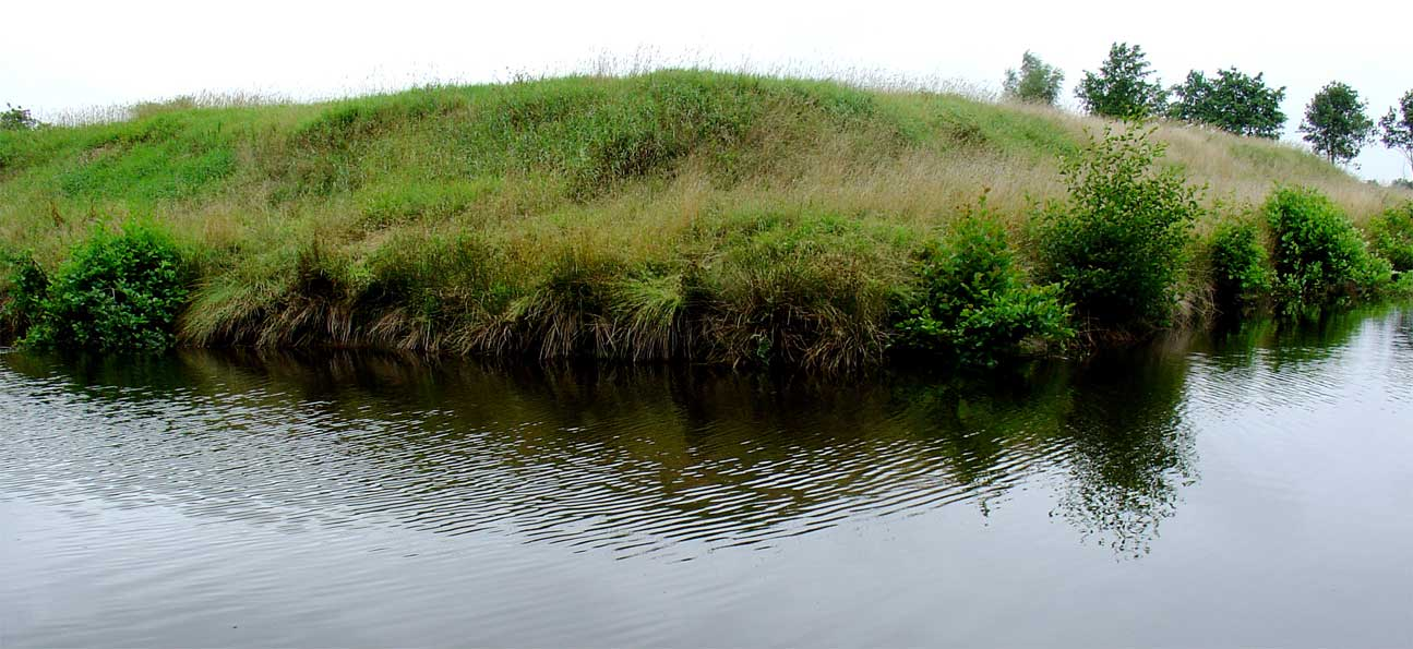 De letherschans (een rechthoekige redoute)